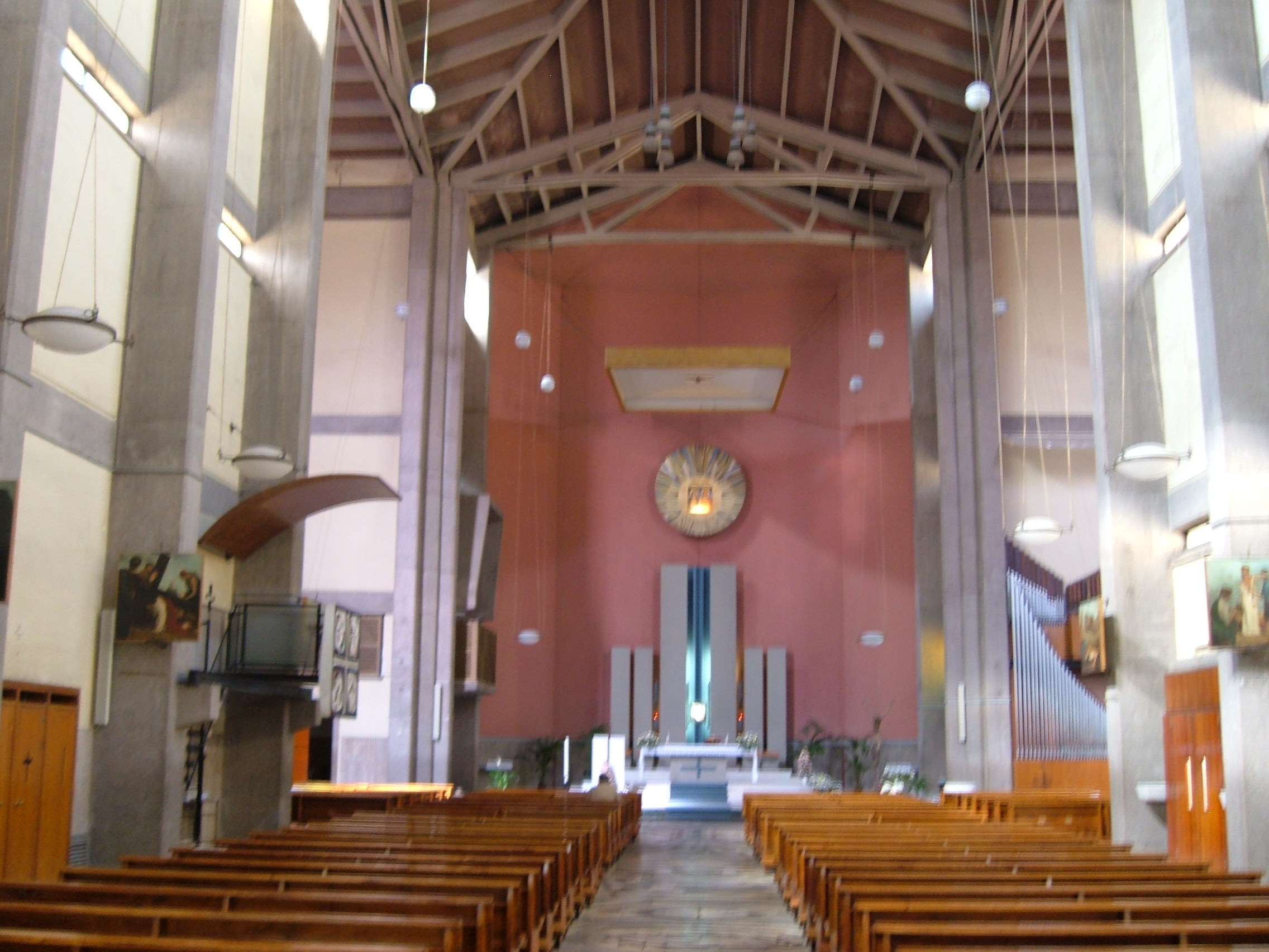 Chiesa dei Sacri Cuori di Gesù e Maria, a Roma, nel quartiere Trieste.